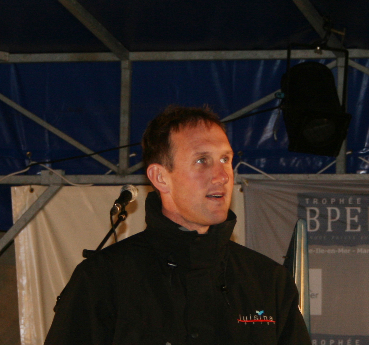 Description =Eric Drouglazet. Soirée présentation des skippers a Belle-Ile lors du Trophée BPE Source =Photo taken by Remi Jouan Date =Mars 2007 Author =Remi Jouan